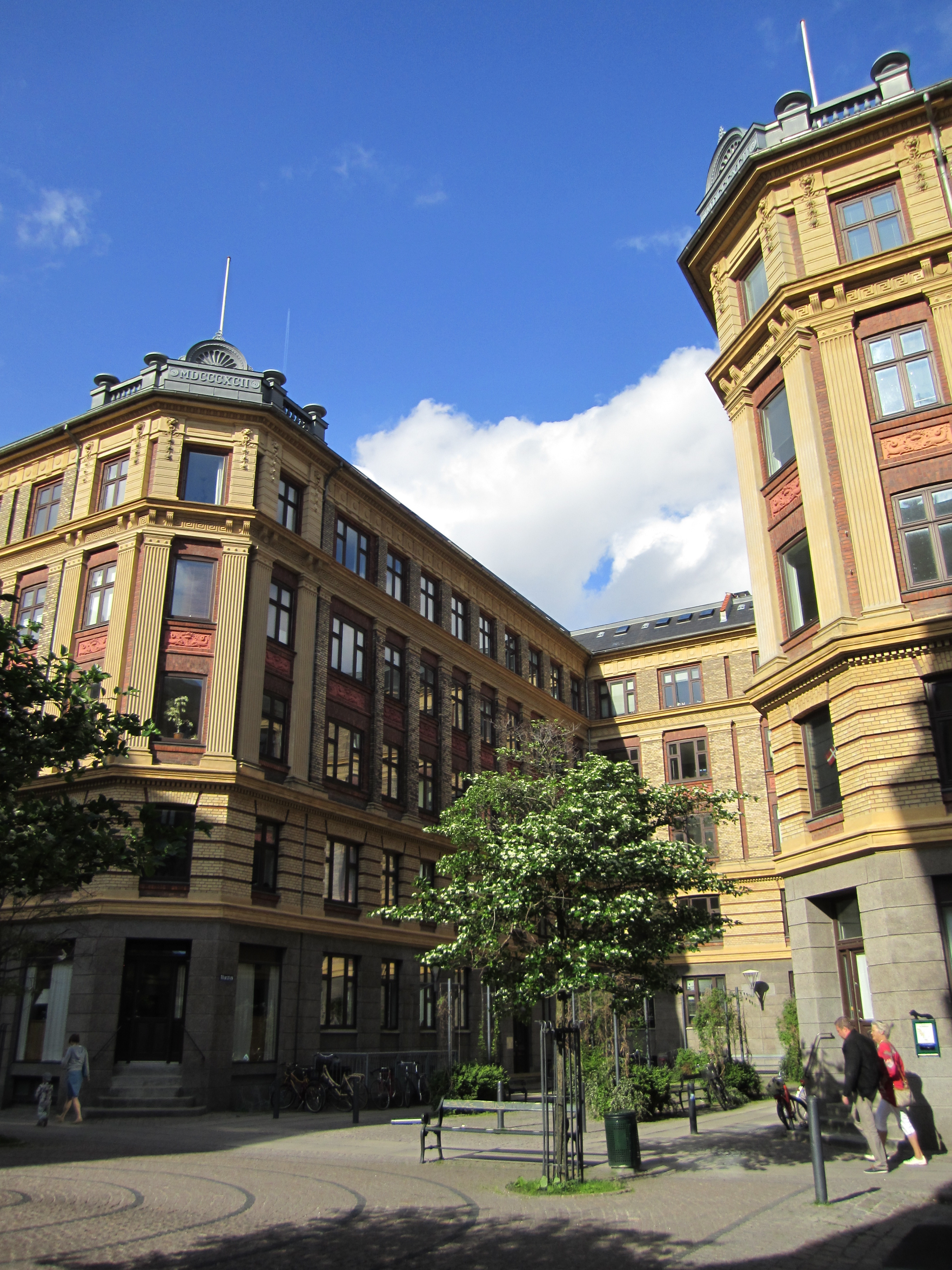 Skydebanegade in Copenhagen, Denmark